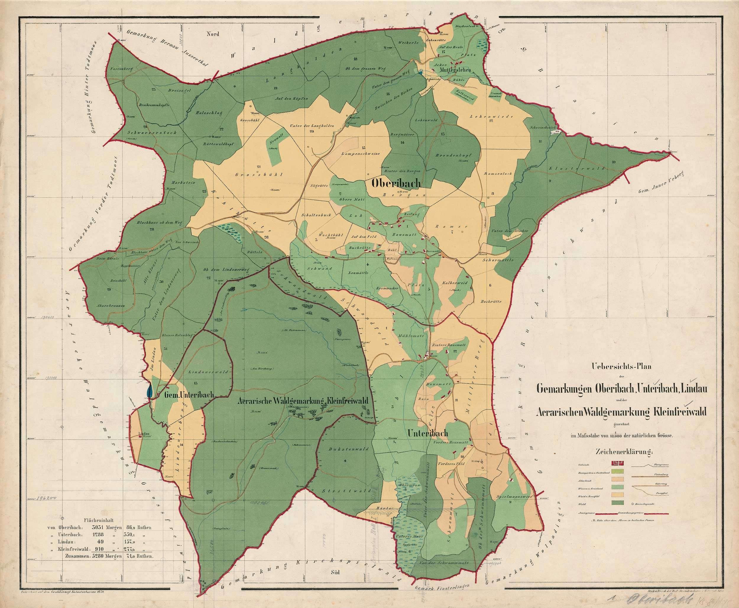 Gemarkungskarte 1:10.000 Ibach (Oberibach und Unteribach); Lindau; Kleinfreiwald